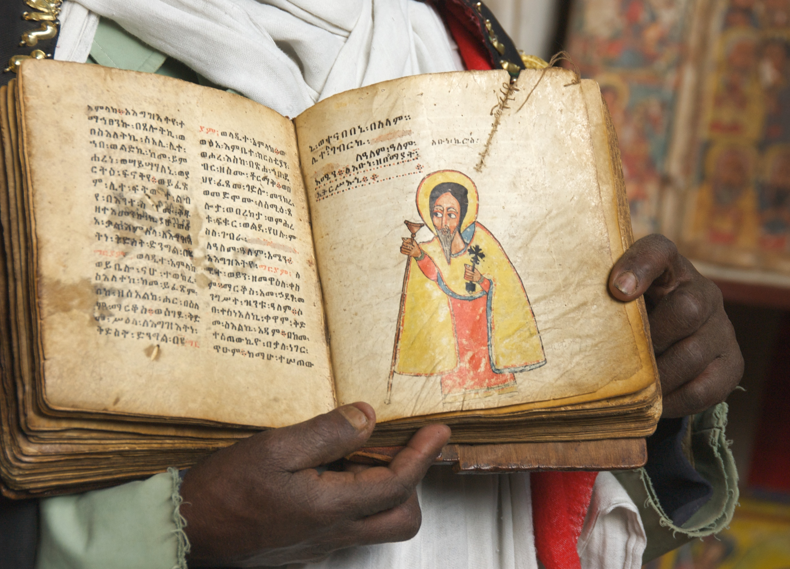 Near Lalibela, Ethiopia.